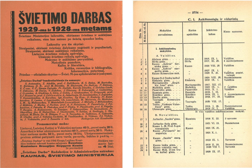 Vaizdinis šaltinis, liudijantis, kad pirmoji Lietuvos švietimo istorijoje lietuviška gimnazija 1915-aisiais buvo įkurta Panevėžyje.